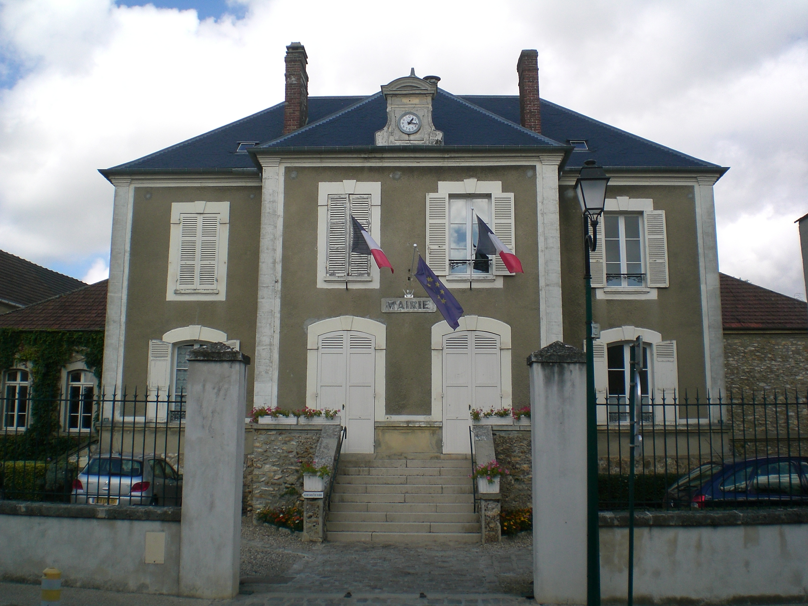 mairie de Cormeilles-en-Vexin val d'oise france